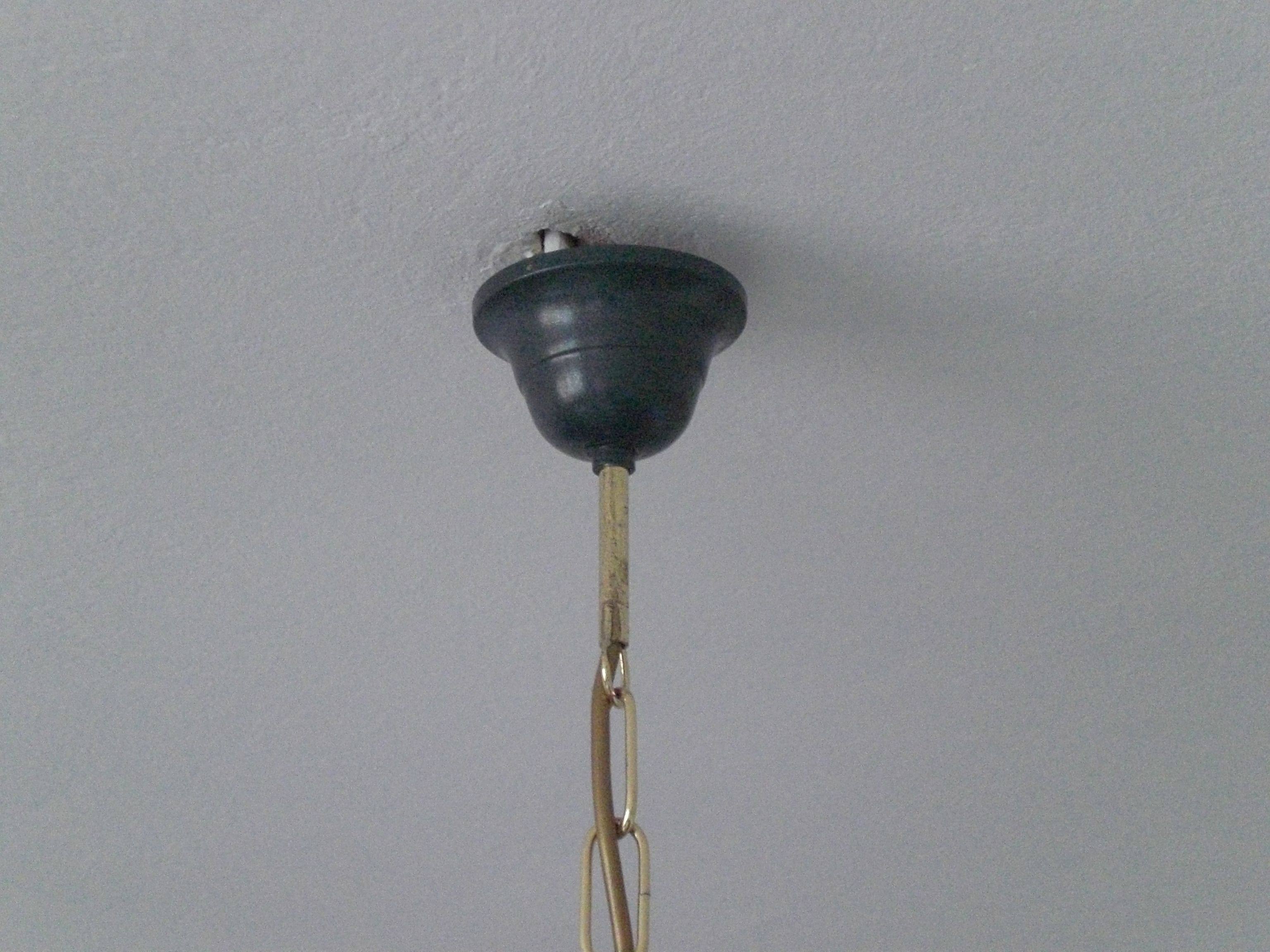 Baldachin zum Abdecken der Anschlussleitungen bei Deckenleuchten